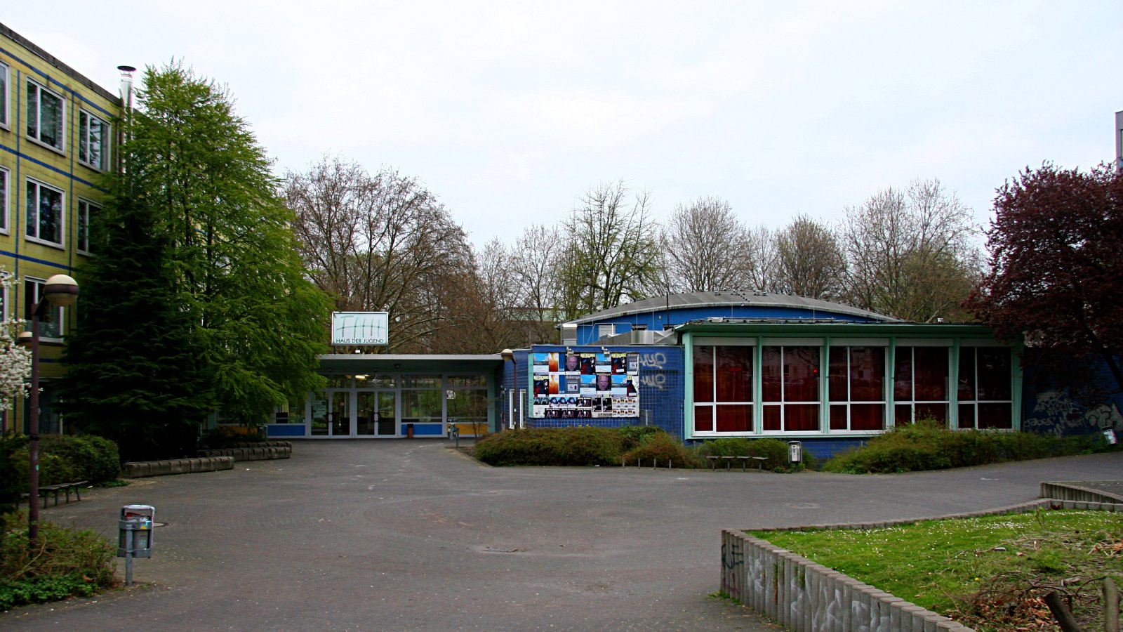 Die Veranstaltungshalle am Fritz-Henßler-Haus vom Schwanenwall aus gesehen